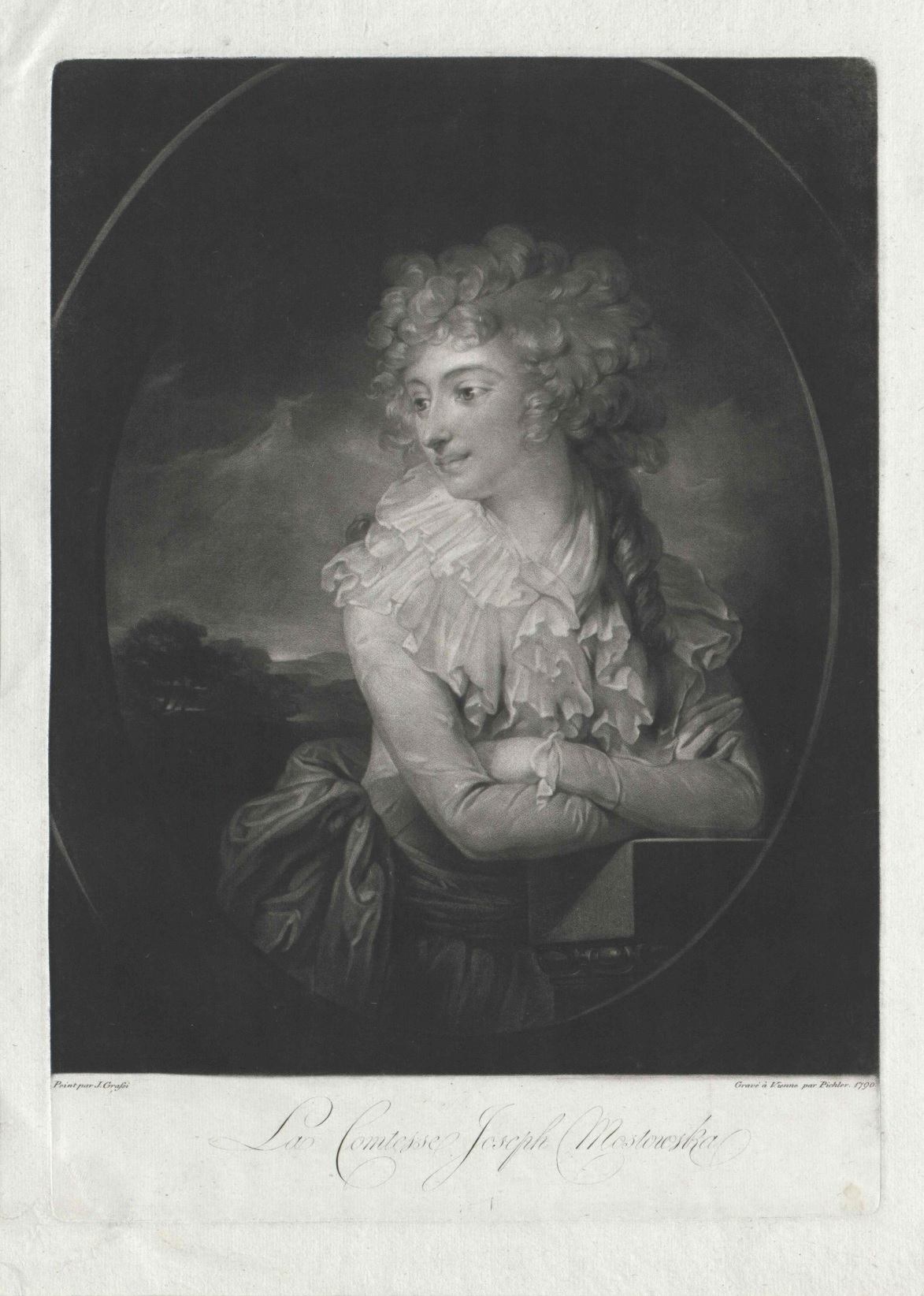 Domicella z Siekierzyńskich Mostowska